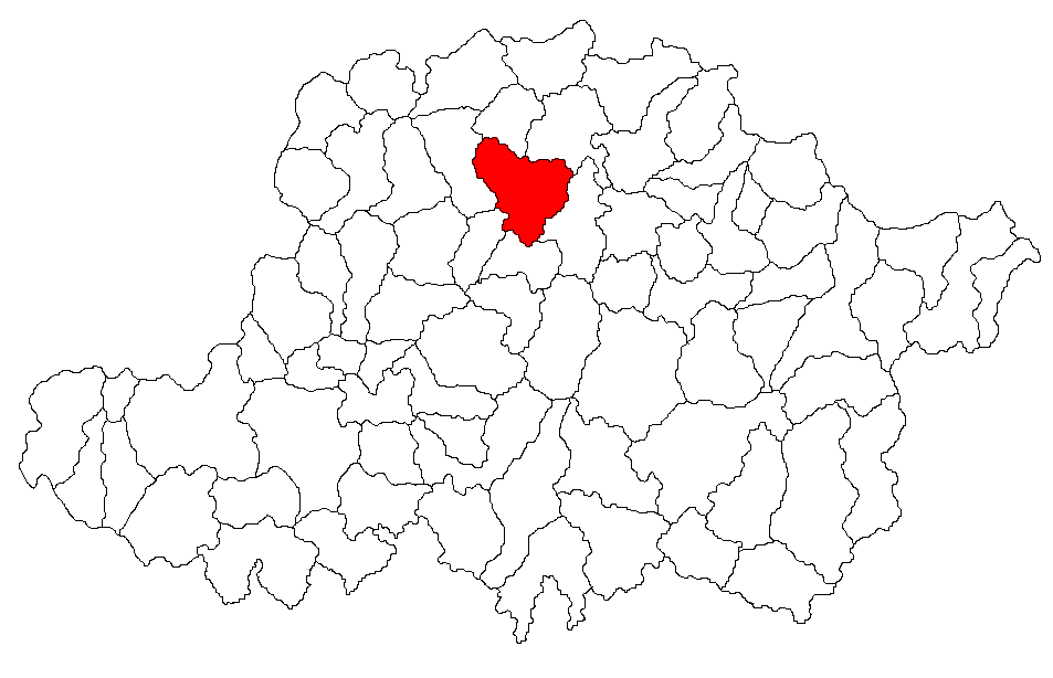 Categorie:Hărţi ale judeţului Arad